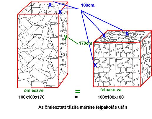 Erdész megnevezésű köbméter